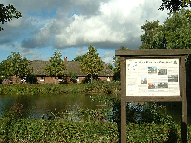 Dorfweiher in Schönwalde, Schleswig Holstein